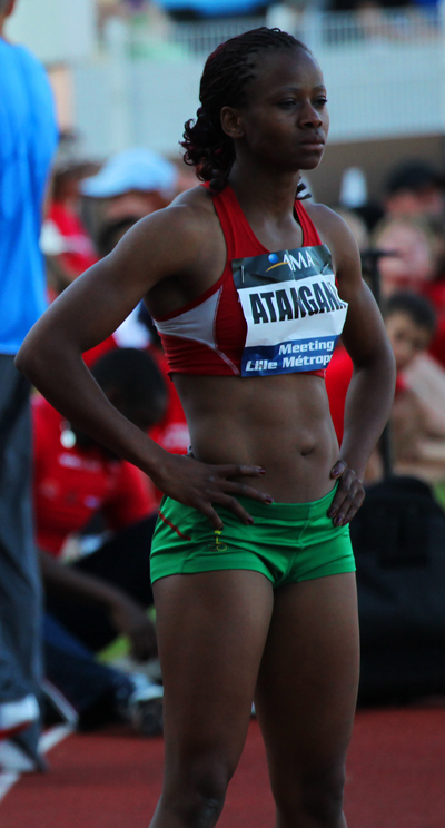 Emma Ania, Hanna Mariën